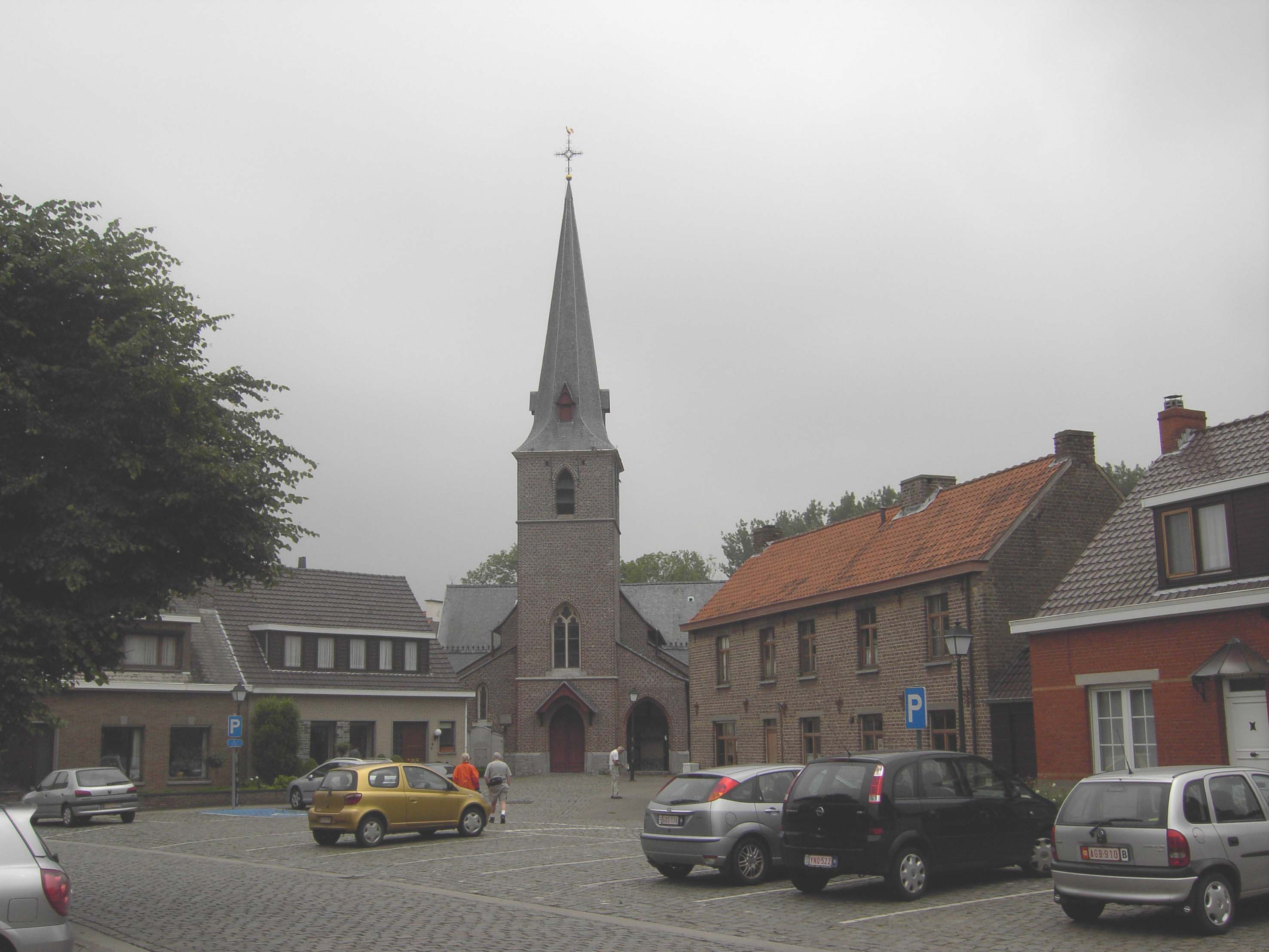 Moortsele - Oosterzele - Sint-Amanduskerk